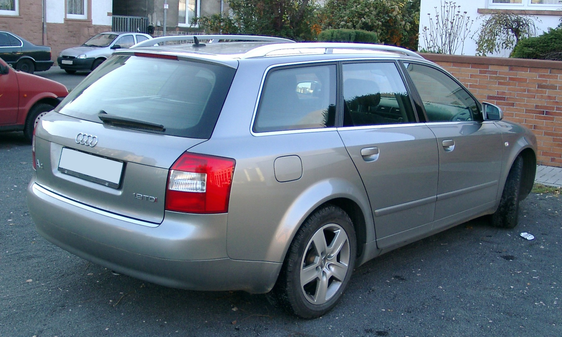 Audi A4 B6